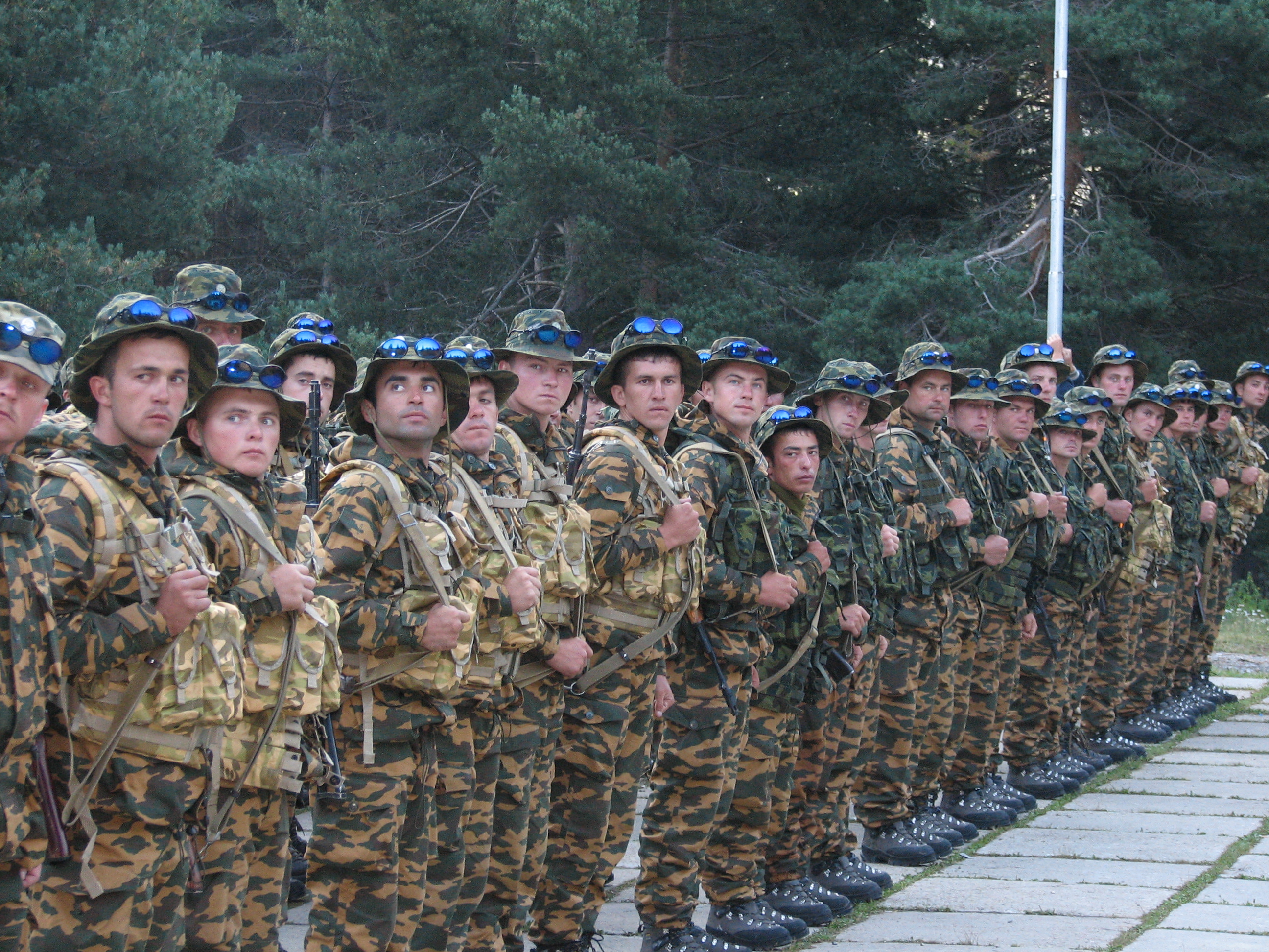 Перед штурмом г.Эльбрус, август 2007 год, ЦАО МО Терскол, 33 горная бригада